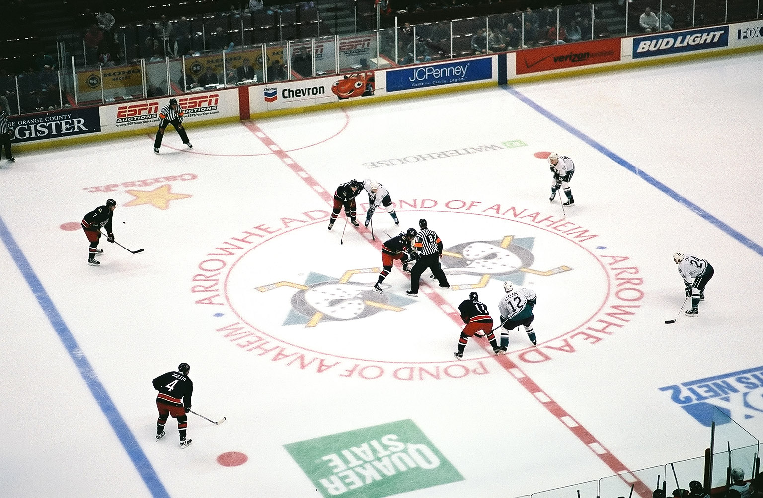 Blue Jackets @ Ducks